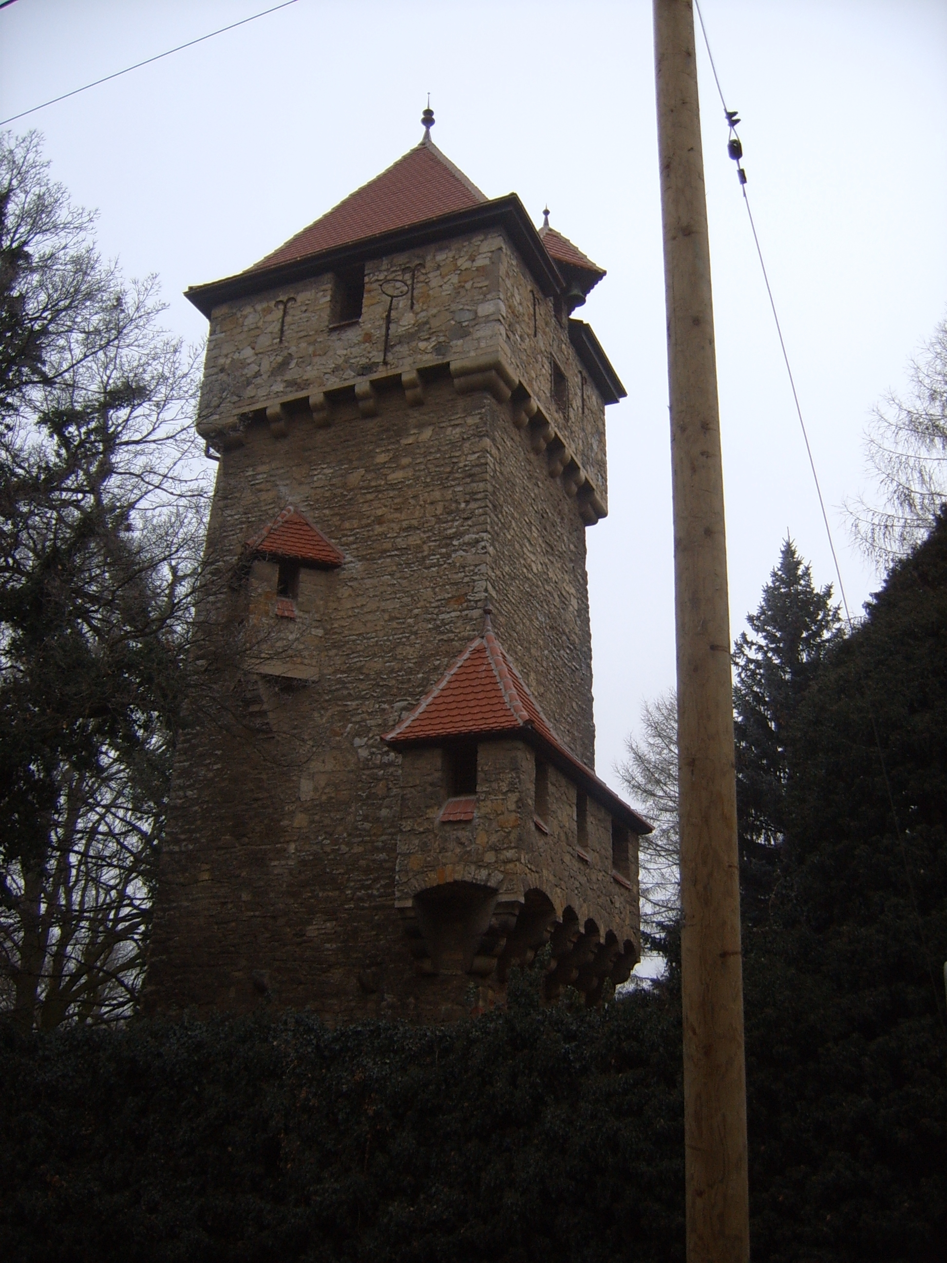 Schloss Neugattersleben (Wachturm)